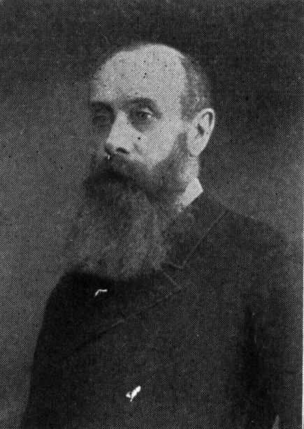 Lord L. S. Sackville-West